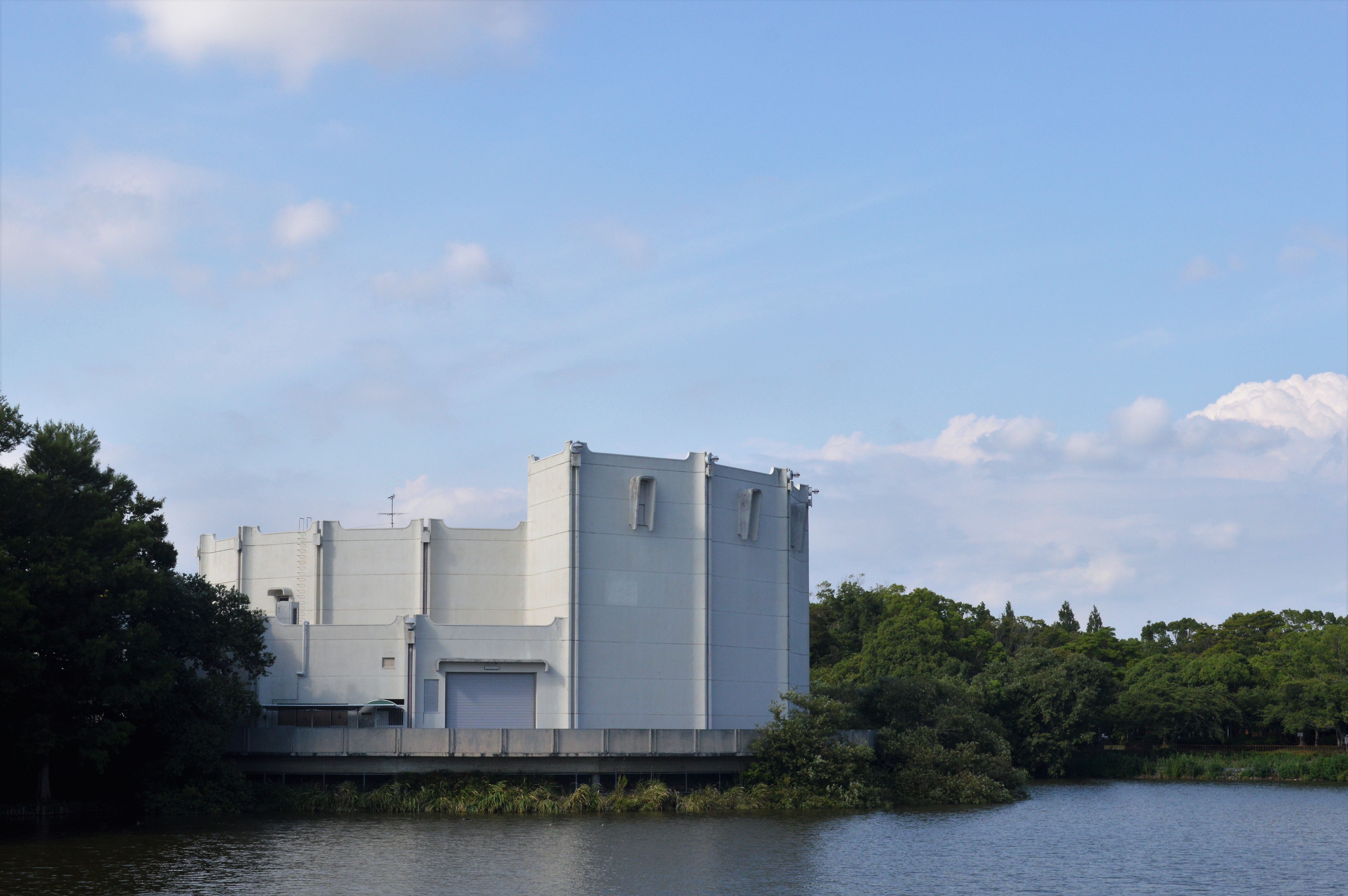 愛知県豊橋市の豊橋市民文化会館。